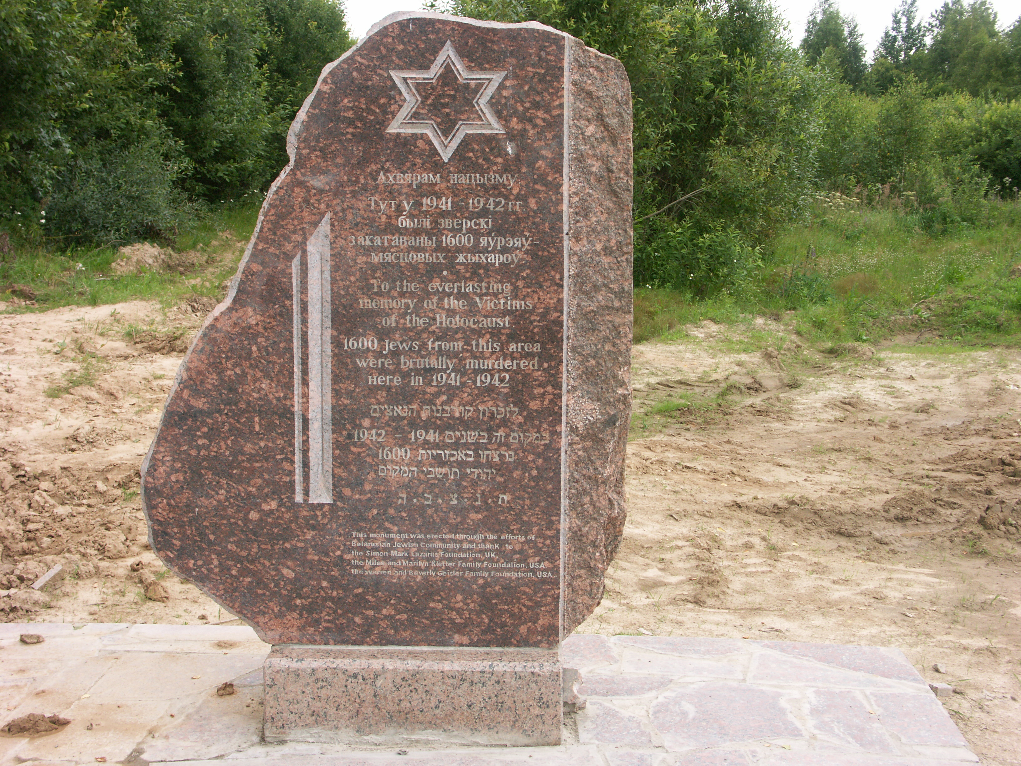 Новый памятник убитым евреям Яновичского гетто между деревней Зайцево и Яновичами.